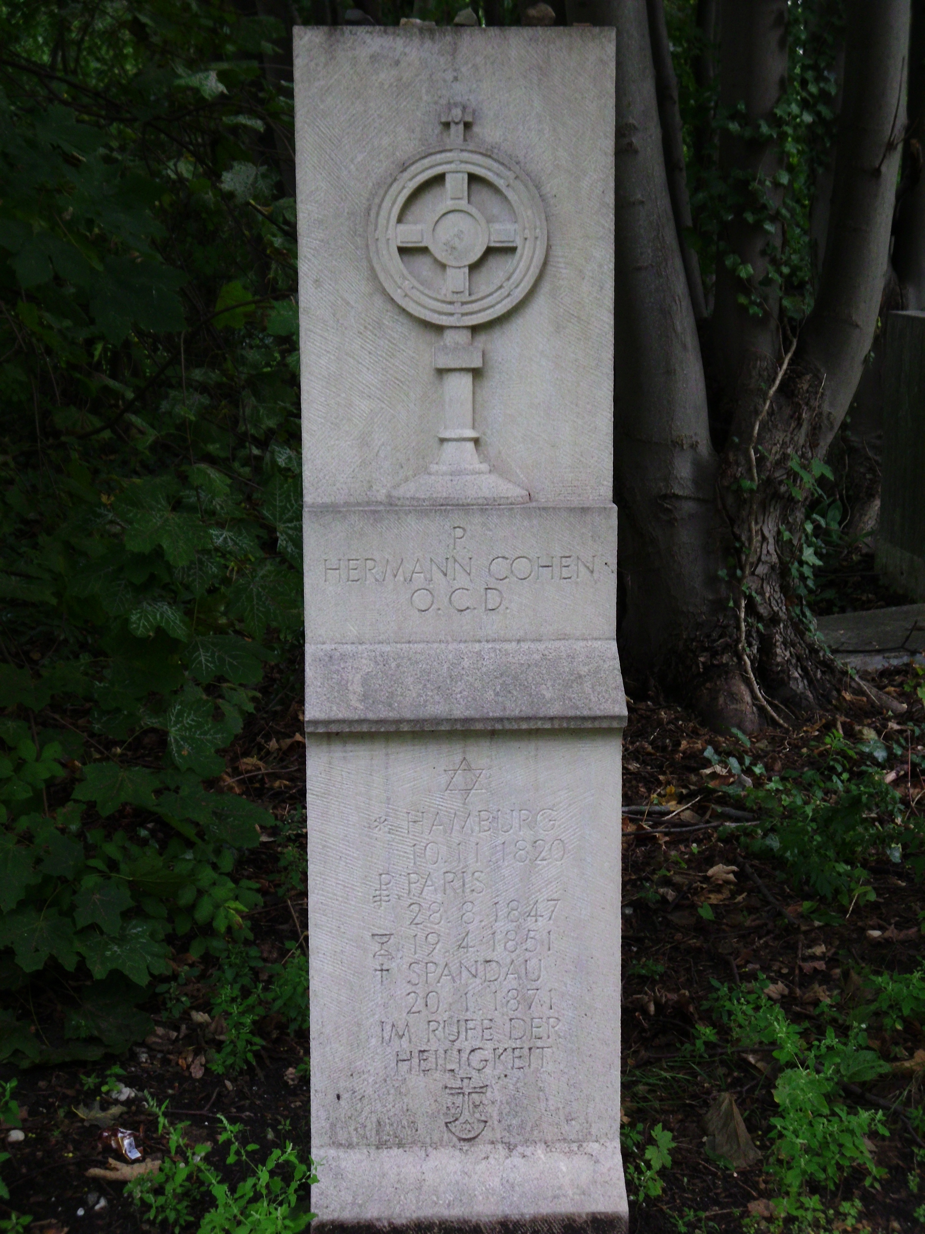 Der Grabstein von Hermann Cohen auf dem Domfriedhof